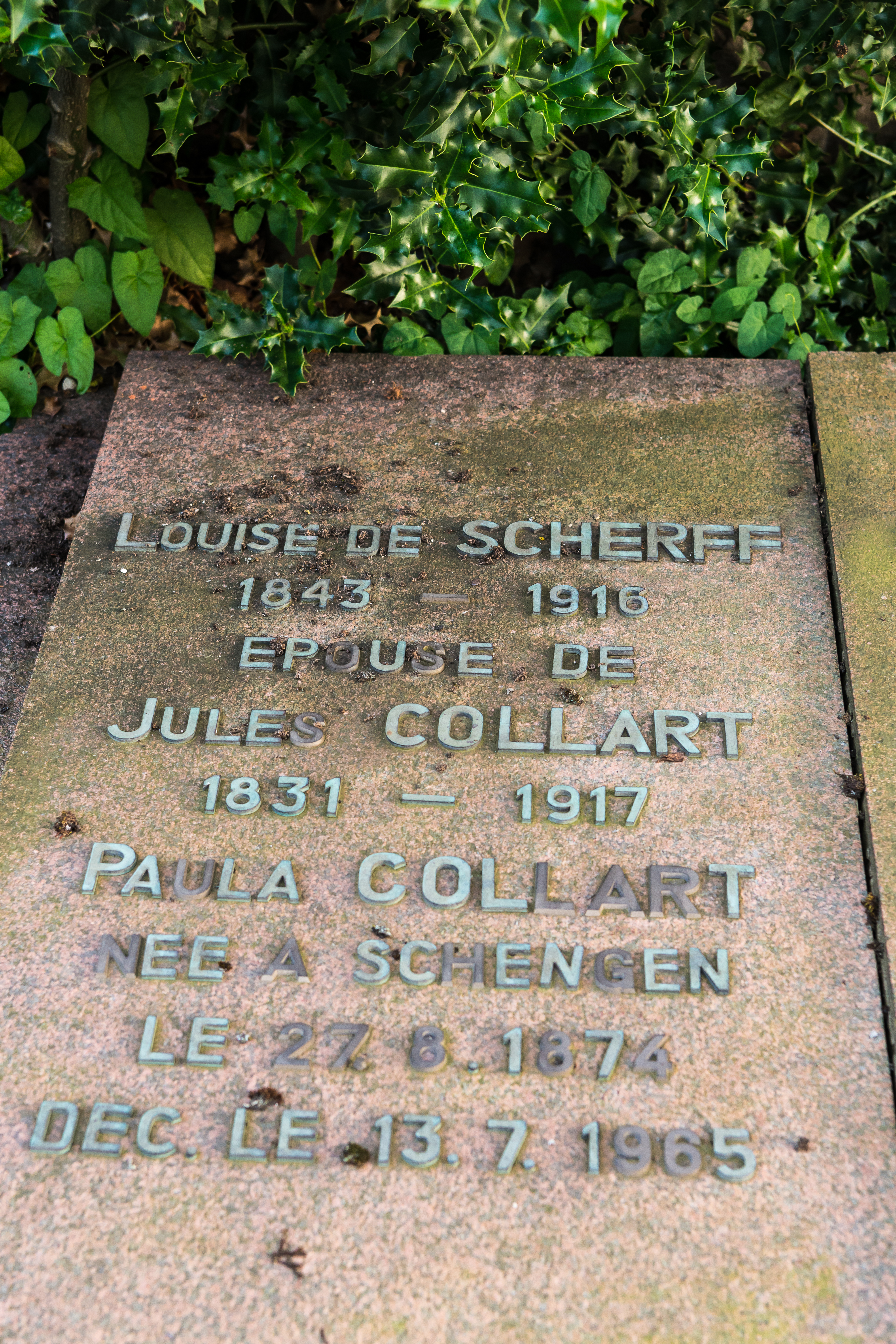 D'Graf Collart-de-Scherff um Kierfecht zu Schengen.